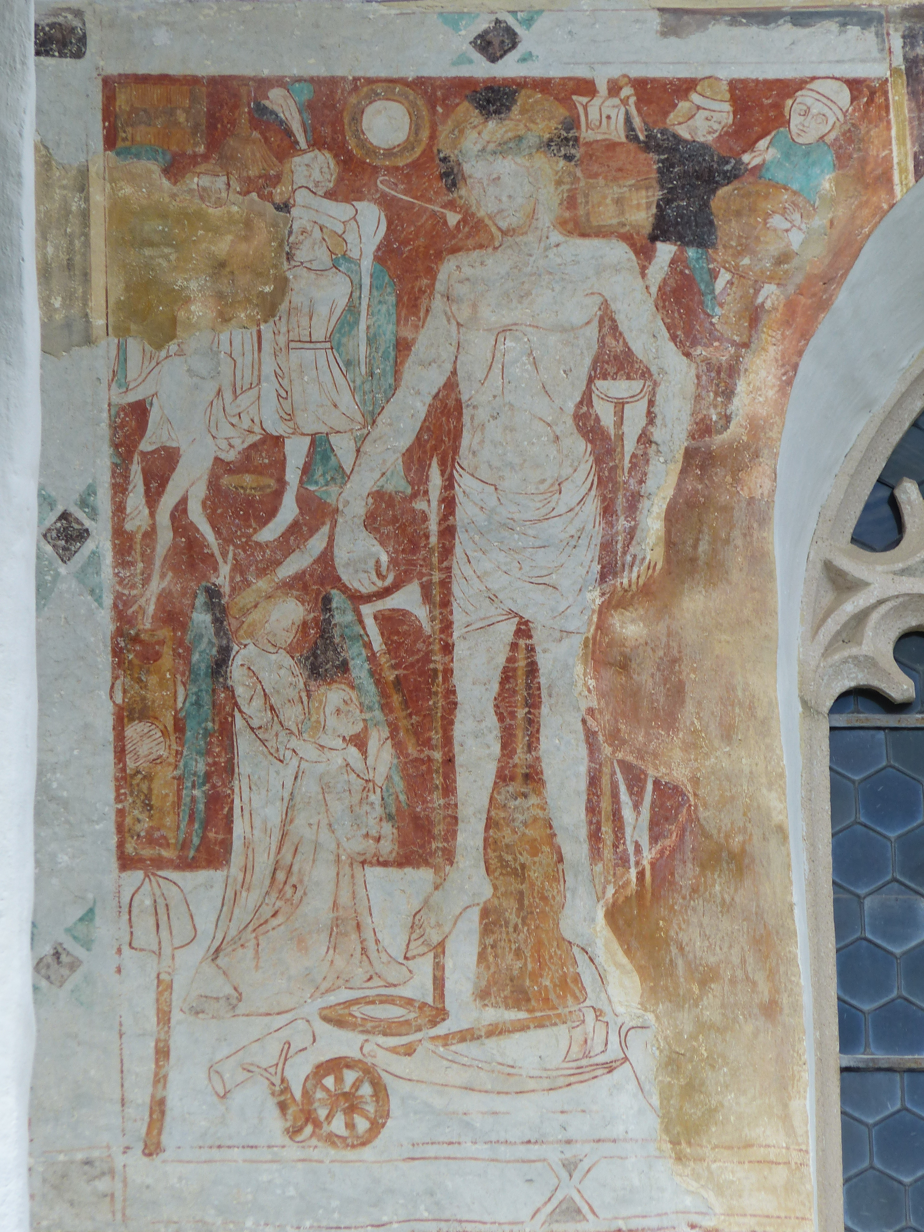 Feiertagschristus in der Reformierte Kirchen Waltensburg